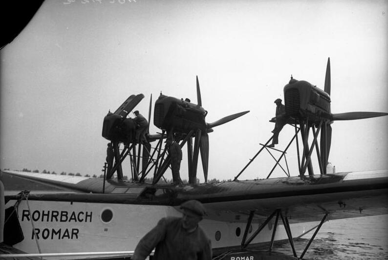 Der este Start des Ozean. Riesenflugbootes Rohrbach in Travemünde ! Das Rohrbach-Riesen-Flugboot ist das grösste der Welt. Es wiegt 300 Ctr. Die Flüfelspannweite beträgt 37 m, die Rumpflänge 22,70 m. Es ist mit 3 Motoren von insgesamt 2400 P.S. ausgestattet. Das ganze Boot besteht aus 8 wasserdichten Schoten wie sie die Ozeandampfer haben, welche bei Havarie völlig gegeneinander abgeschlossen und ein Untergehen des Flugbootes verhindern.